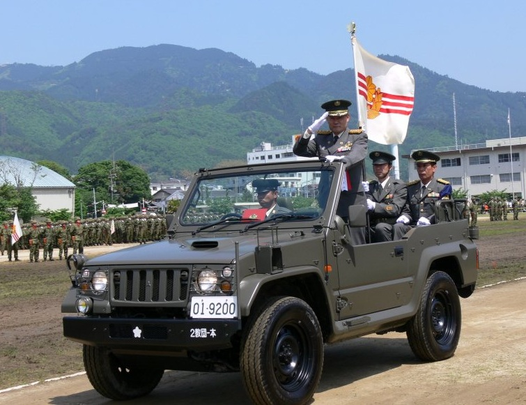 第2教育団創立記念を見学した際に撮影した写真より（2006年頃だったような）